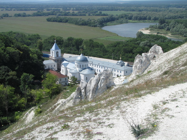 Дивногорский Успенский монастырь. фотография сделана в 2009 с меловой горы